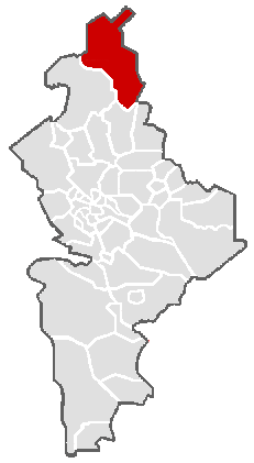 Localización del municipio de Ciudad Anáhuac, en el estado mexicano de Nuevo León.